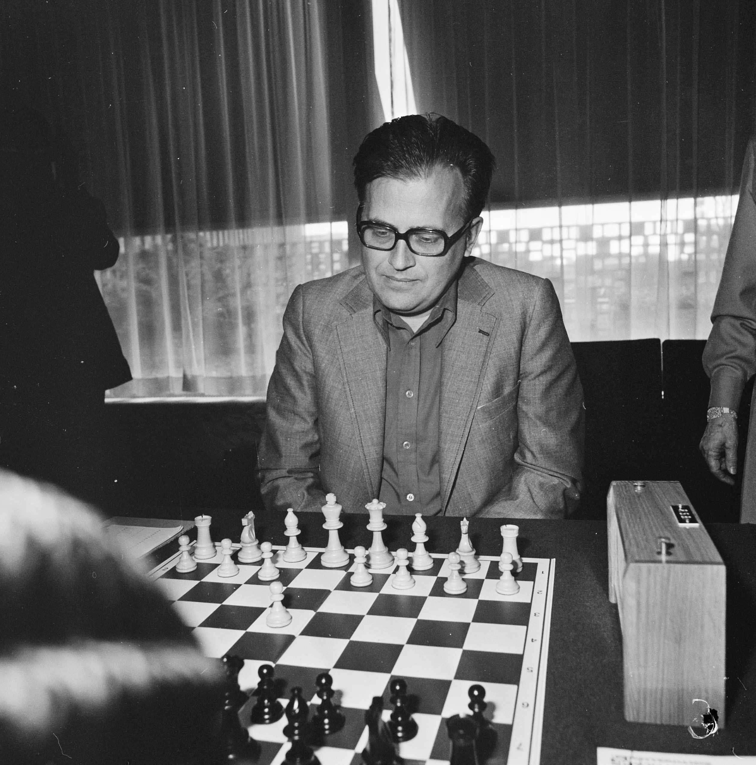 Collectie / Archief : Fotocollectie Anefo Reportage / Serie : Kwartfinale kandidatentoernooi voor het WK schaken in Rotterdam tussen Larsen en Portisch Beschrijving : Larsen is aan zet tegen Portisch Datum : 26 februari 1977 Locatie : Rotterdam, Zuid-Holland Trefwoorden : schakers, toernooien Persoonsnaam : Larsen, Bent, Portisch, Lajos Fotograaf : Croes, Rob C. / Anefo Auteursrechthebbende : Nationaal Archief Materiaalsoort : Negatief (zwart/wit) Nummer archiefinventaris : bekijk toegang 2.24.01.03 Bestanddeelnummer : 929-0475